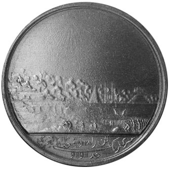 Seringapatam Medal 1808 reverse